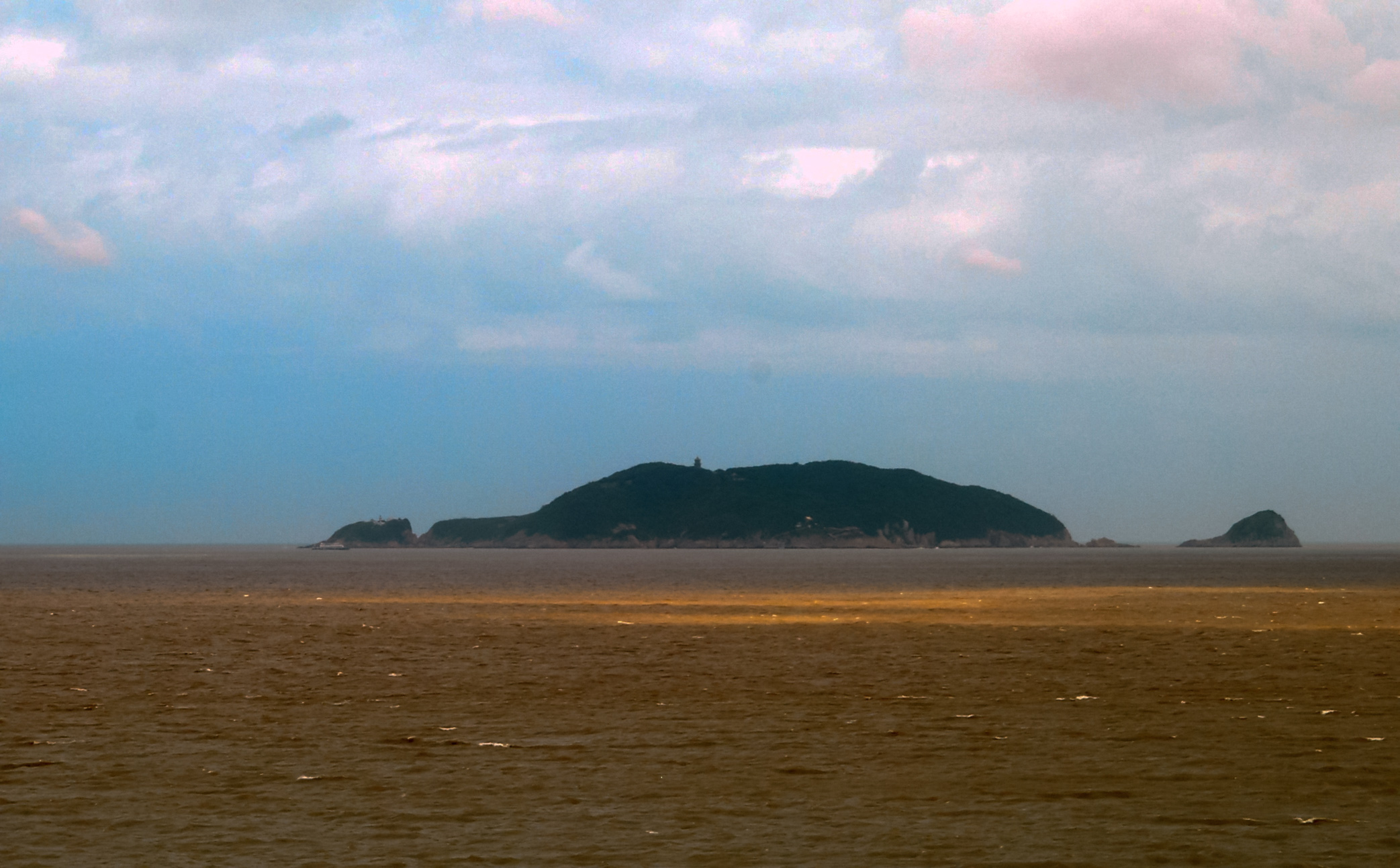 中文（中国大陆）: 普陀山卧佛